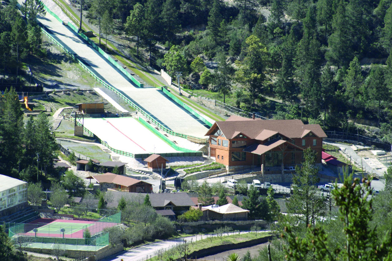 Pista de Esquí Monterreal, Arteaga, Coahuila/ Ski Slope Monterreal, Arteaga, Coahuila